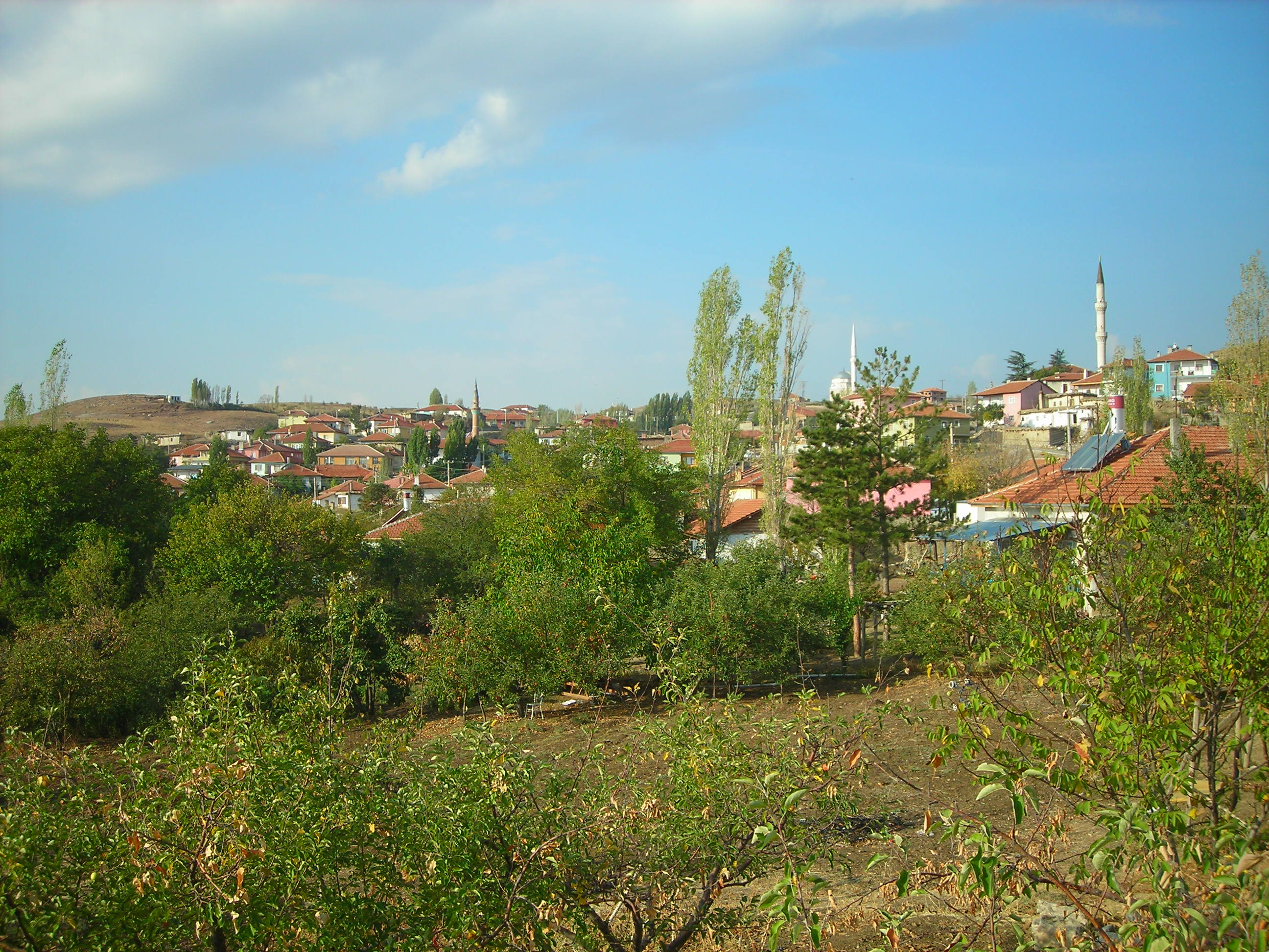 Gümerdiğin Şabanözü Çankırı 2007